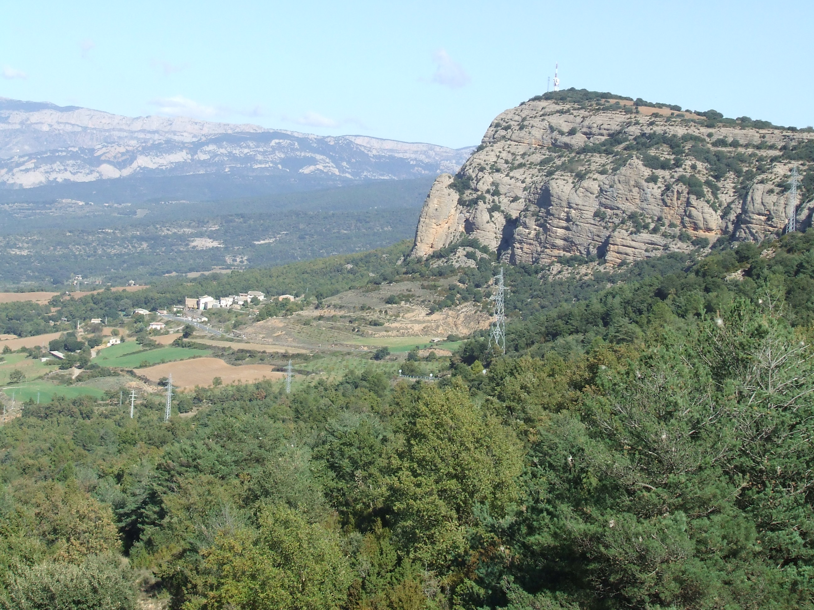 Vista general del poble de Benavent de la Conca (Isona i Conca Dellà, Pallars Jussà)